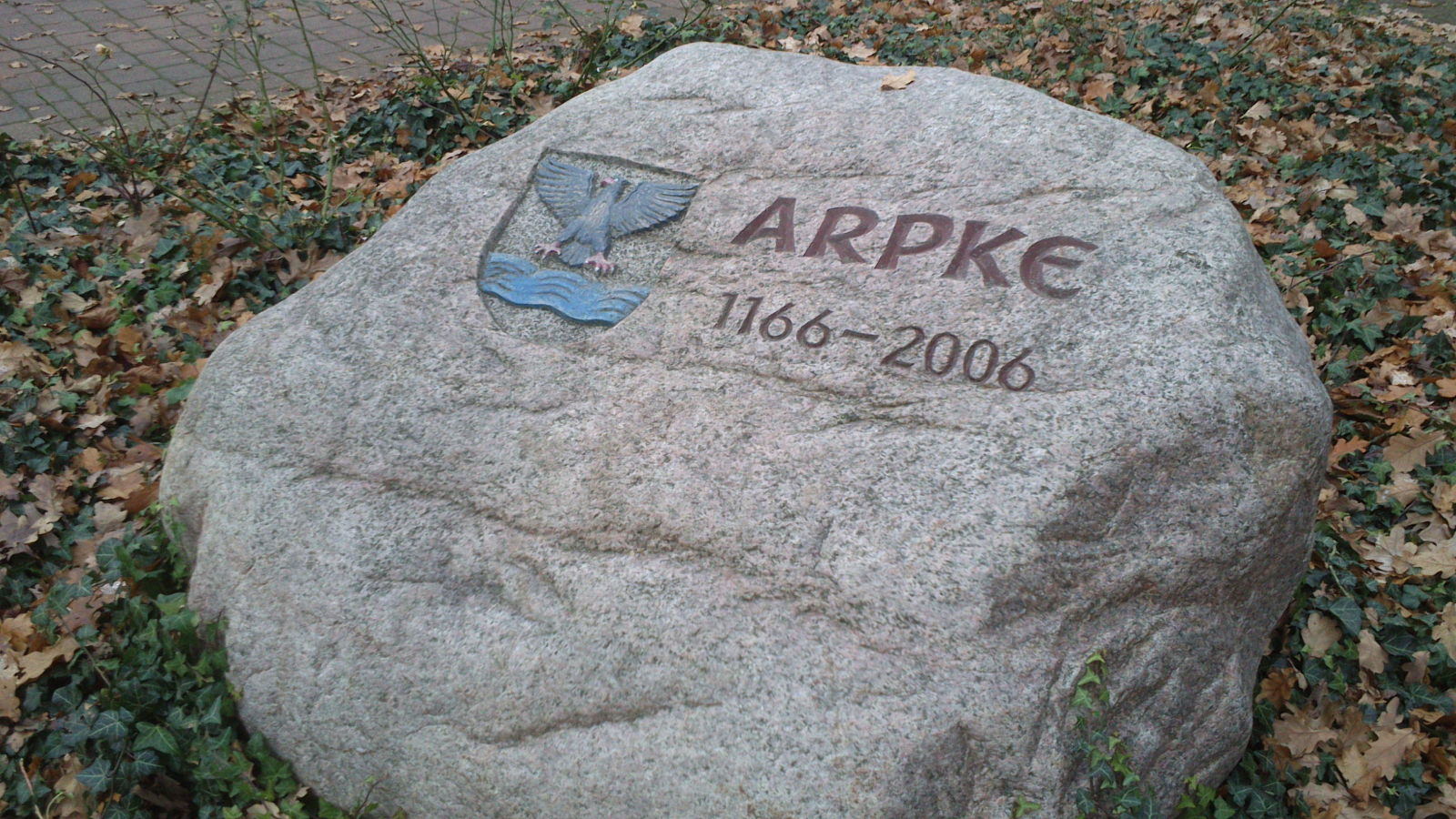 Arpke, Gedenkstein zwischen Dorfteich und neu entstandenem Teich-Boulevard